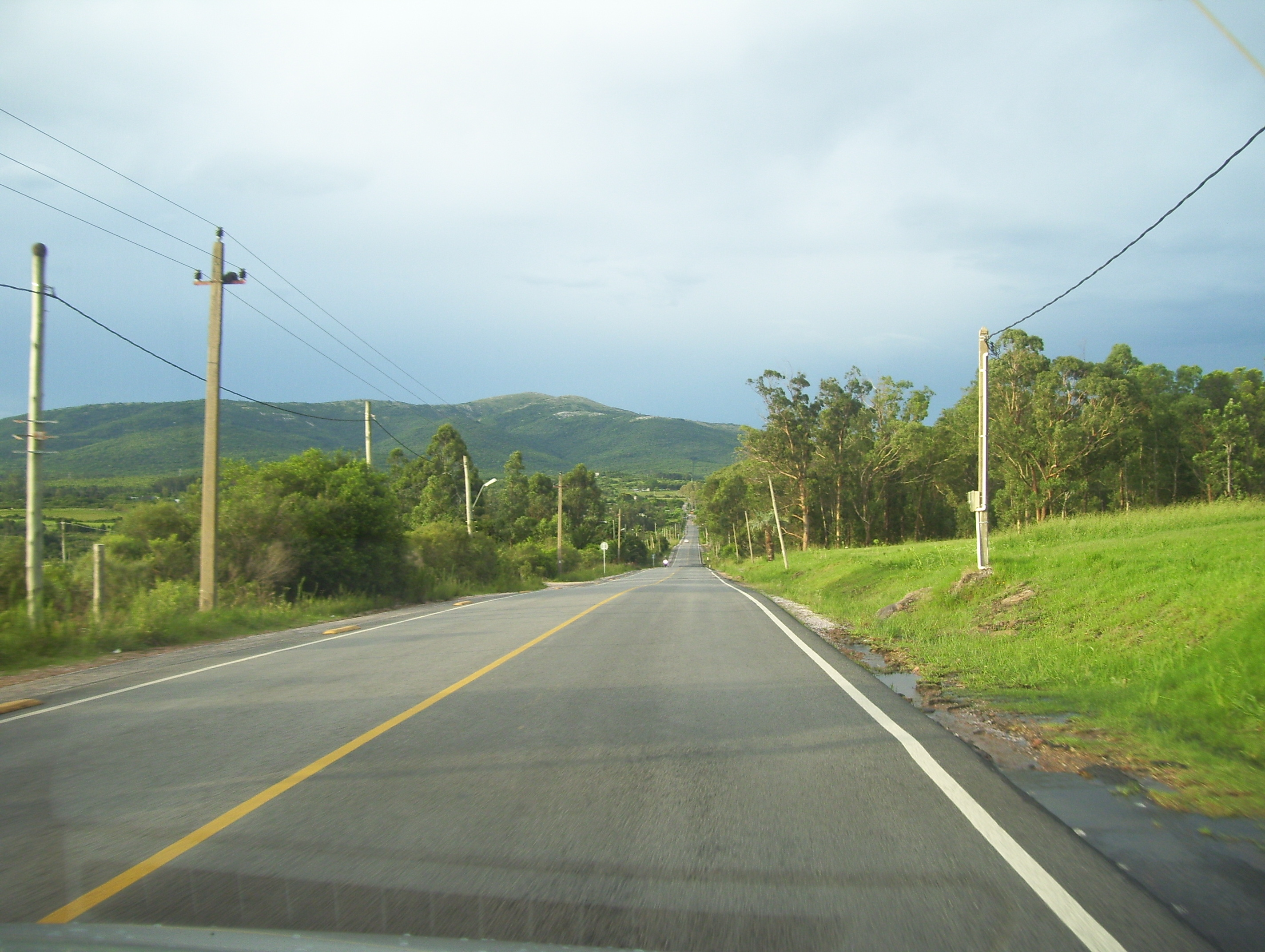 Ruta 71 sentido sur-norte (Las Flores-Ruta IB), Uruguay